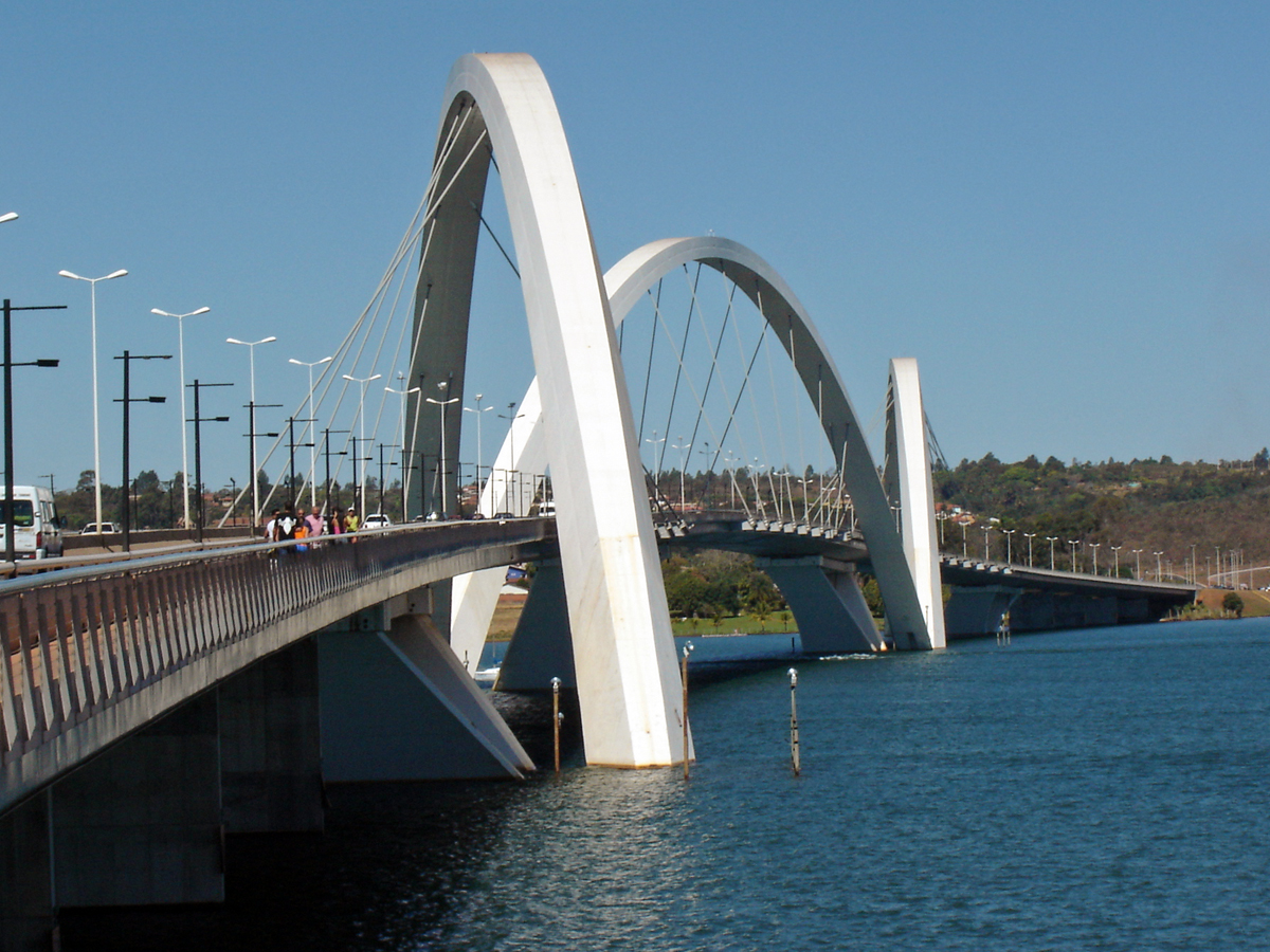 Bridge Juscelino Kubitschek (Ponte JK), Brasilia, D.F., Brazil, 2005